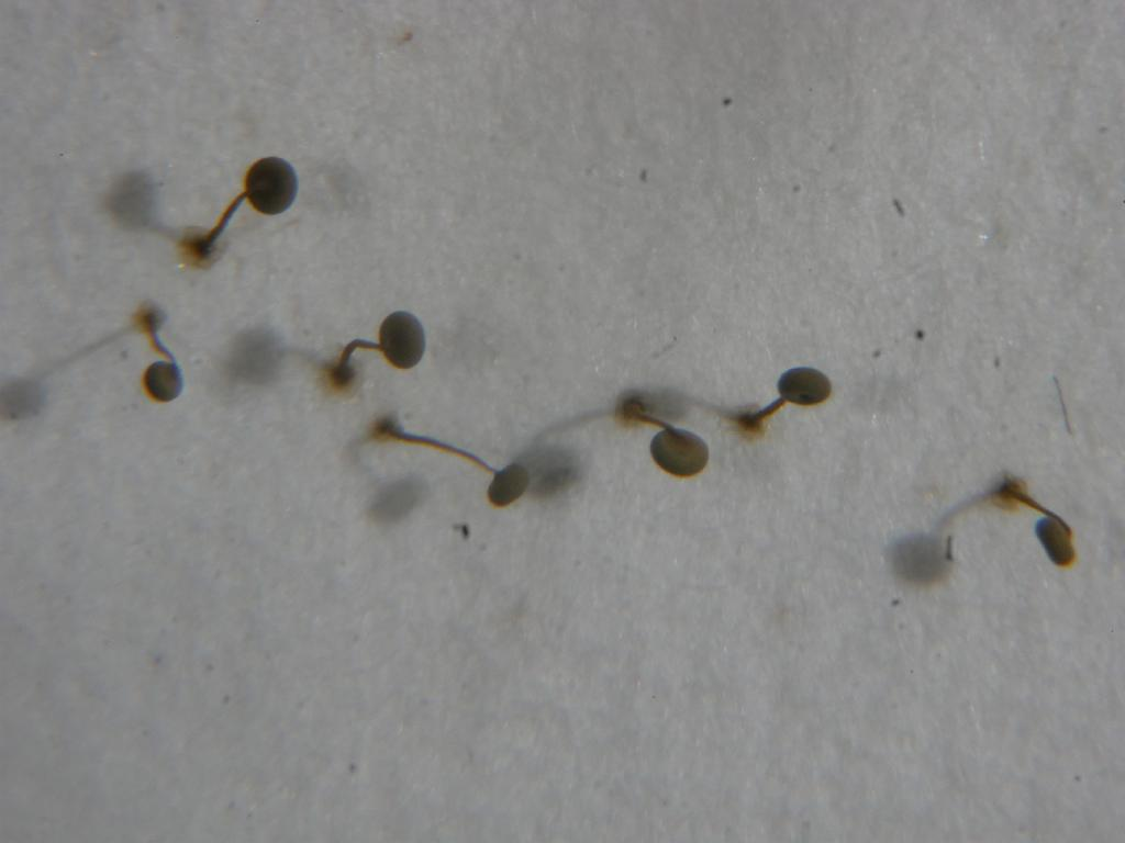 2019/10/16 和歌山県田辺市：Tanabe City. Wakayama Pref. Japan